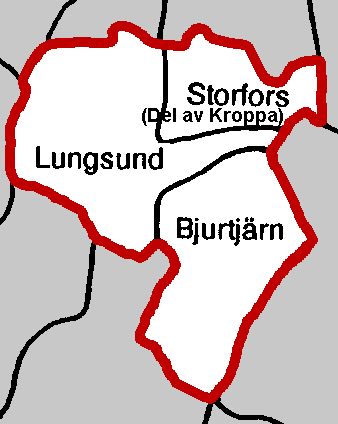 old municipalities